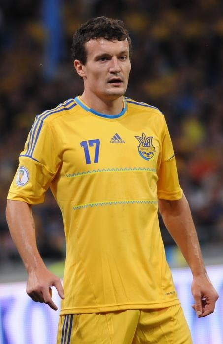 Артем Федецкий во время матча Украина - Англия